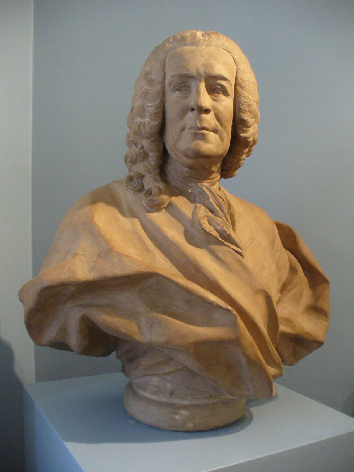 Buste de Paris-Duverney, Musée de Brunoy